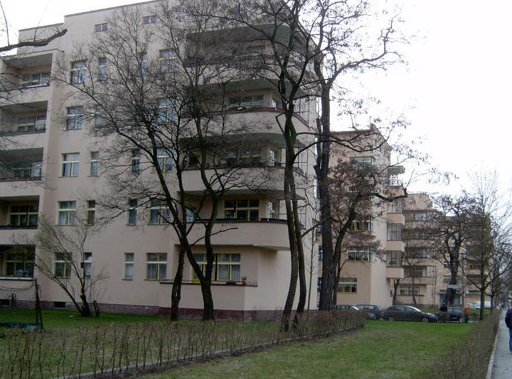 "Wohnstadt Carl Legien" des Architekten Bruno Taut, entstanden 1929/30